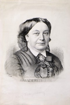 Anna Schepeler-Lette Stich nach zeitgen. Zchng A. Schubert aus Bildmappe Führerinnen der deutschen Frauenbewegung 1883